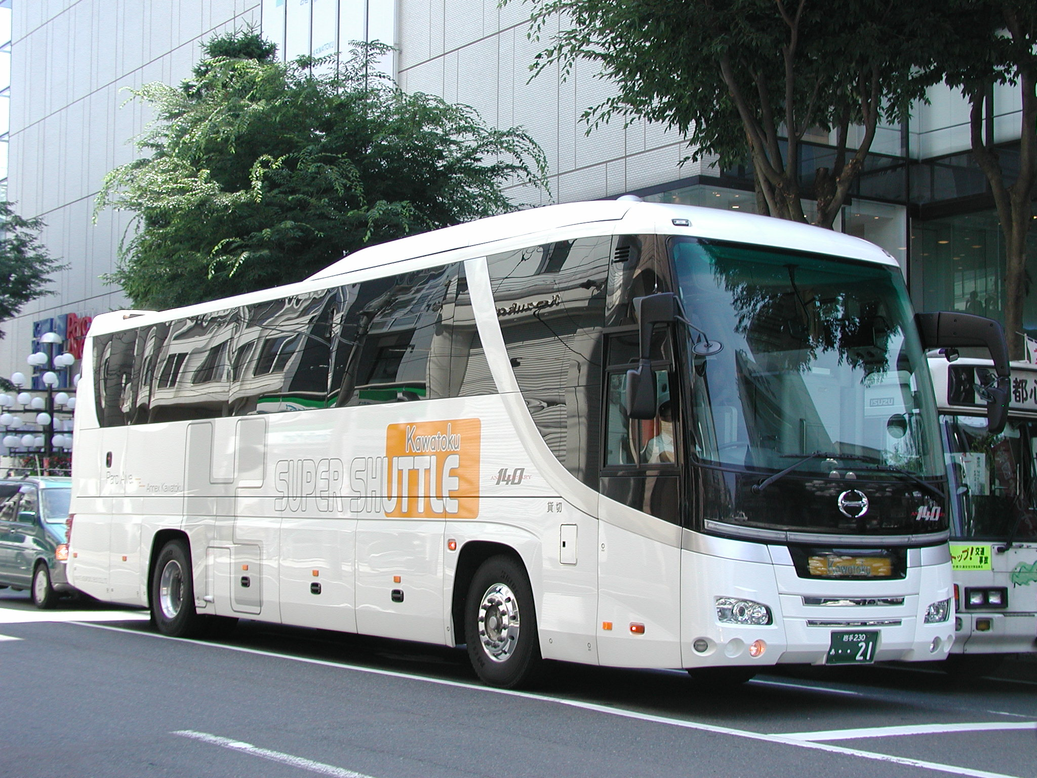 岩手県北自動車：カワトクスーパーシャトル専用車両（日野・セレガ：ADG-RU1ESAA） パルクアベニュー・カワトク近くにて